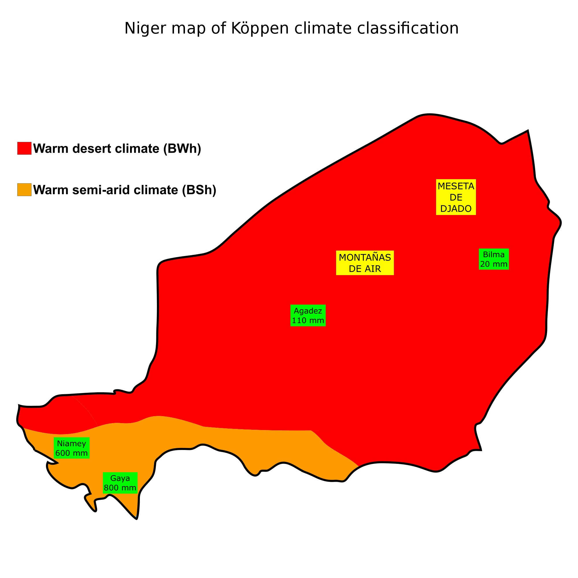 Mapa climático Köppen de Níger con nombres